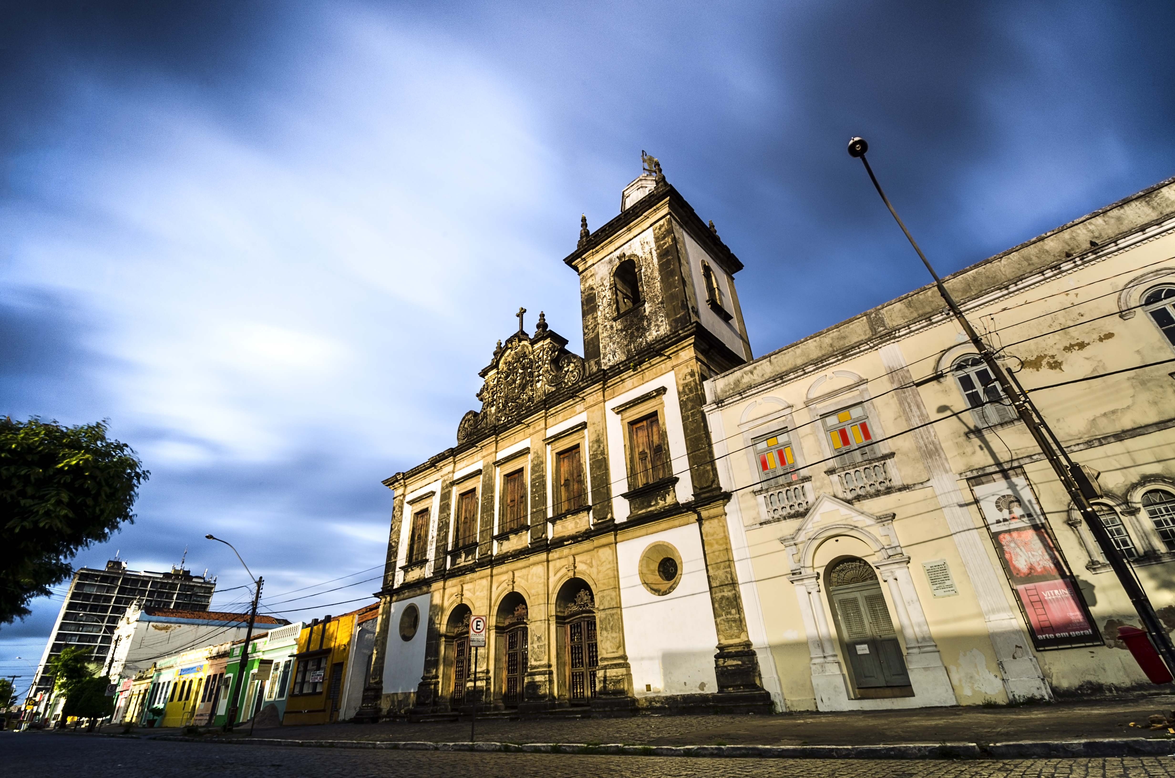 Igreja de São Bento